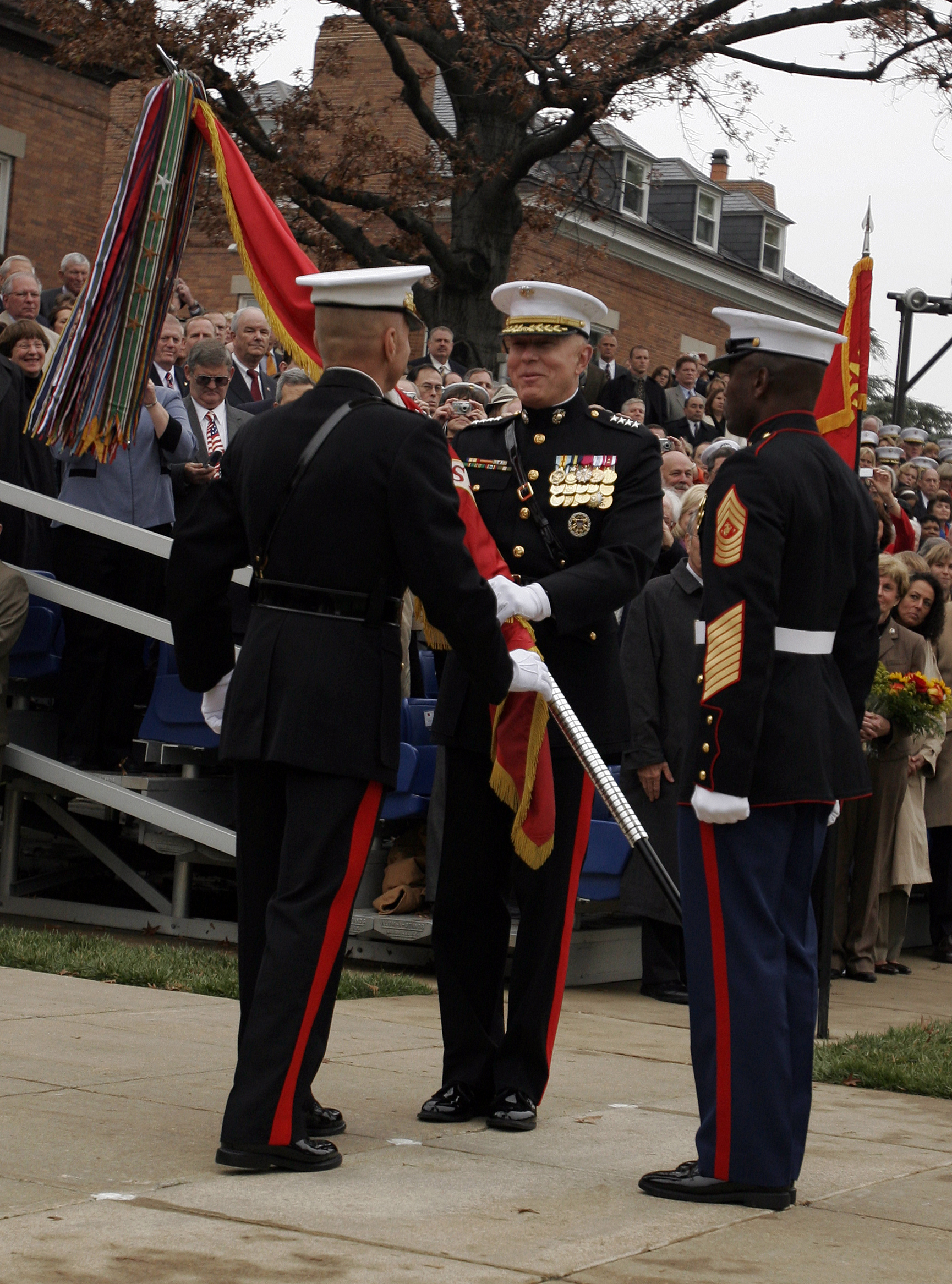 Fonte